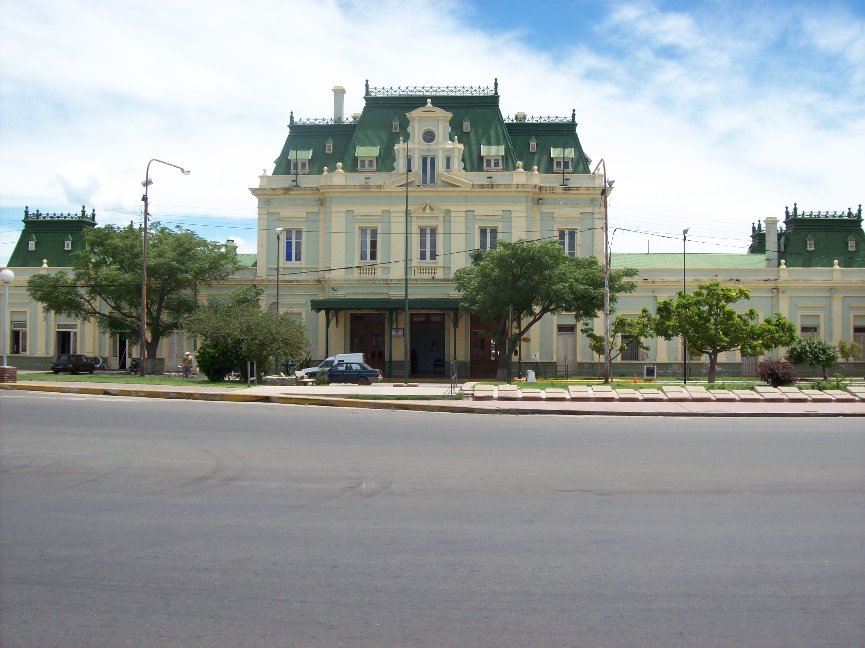 Frente de la antigua estación de ferrocarril de San Luis, en la capital de la provincia del mismo nombre, Argentina.